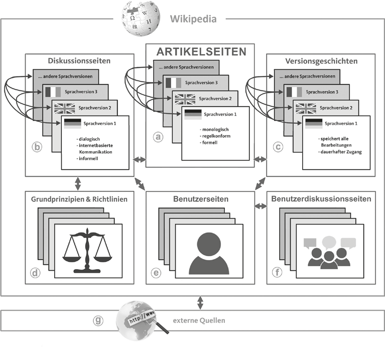 Gredel, 2019, S. 177f: "Allerdings sollten sich neue Wikipedia-Autoren vor den ersten Bearbeitungen mit der komplexen Struktur der Wikipedia auseinandersetzen, wie sie in Abb. 3 schematisch dargestellt ist. Neben den bereits erläuterten Artikelseiten (Abb. 3, a) den Diskussions-seiten (Abb. 3, b) und den Versionsgeschichten (Abb. 3, c) sind auch die weiteren Namensräume aufschlussreich: Auf entsprechenden Spezialseiten ist das ausdifferenzierte System an Grundprinzipien und Richtlinien (Abb. 3, d) zu finden, das determiniert, wie Wikipedia-Autoren im Wiki inter-agieren können. Dort ist z.B. auch geregelt, dass die persönliche Profilseite (Benutzerseiten, Abb. 3, e) nur von dem Autor bearbeitet werden kann, dem diese Seite „gehört“. Die jeweilige hypertextuell verlinkte Benutzer-diskussionsseite (Abb. 3, f) steht grundsätzlich allen Wikipedia-Autoren zur Bearbeitung offen und erlaubt es, Beiträge eines einzelnen Wikipedia-Autors zu diskutieren."